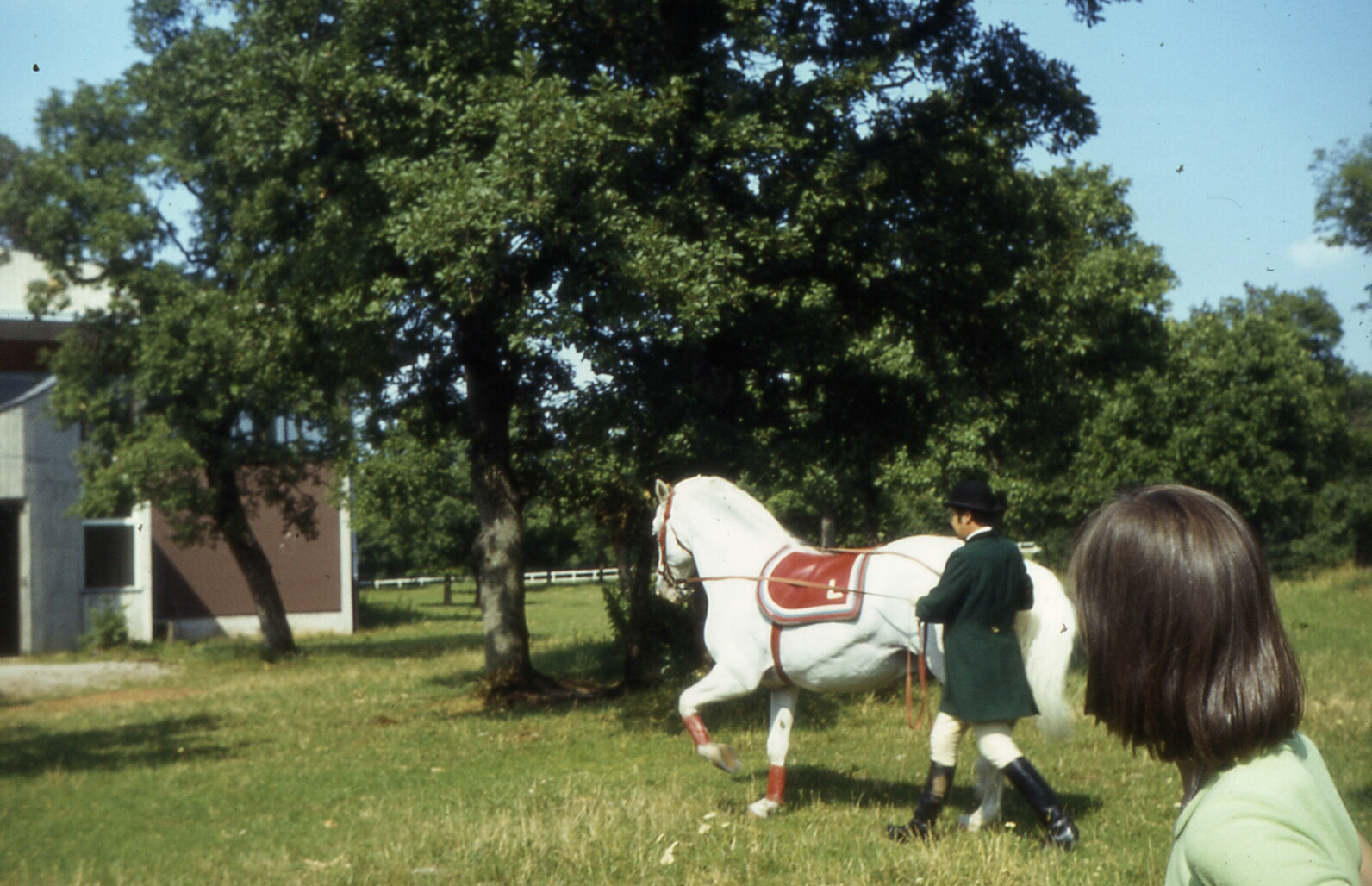 Sežana Lipica Lipicaner 1978-2